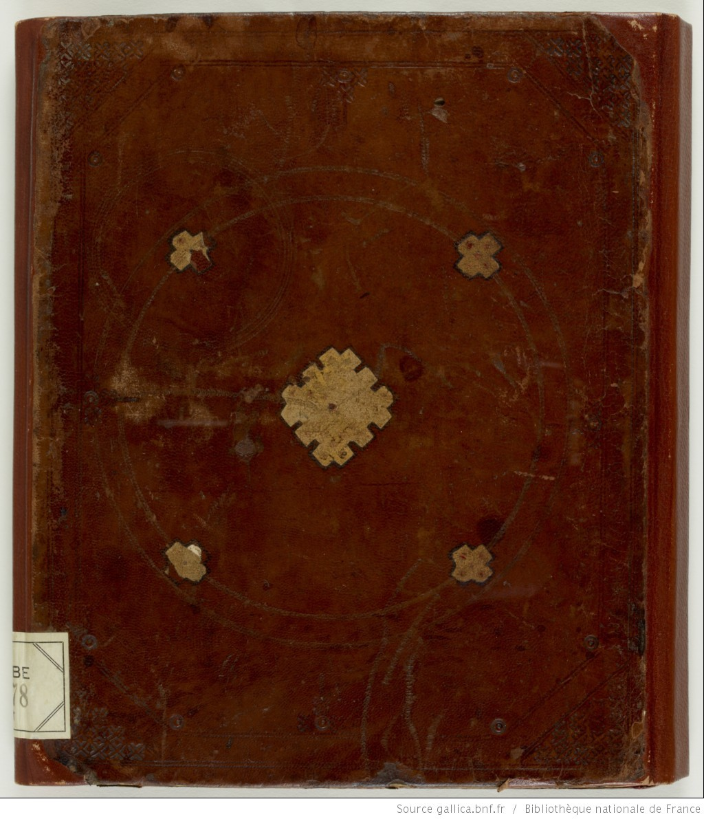 غلاف كتاب الطبلة لعلى بن احمد بن محمد الصفاقسي